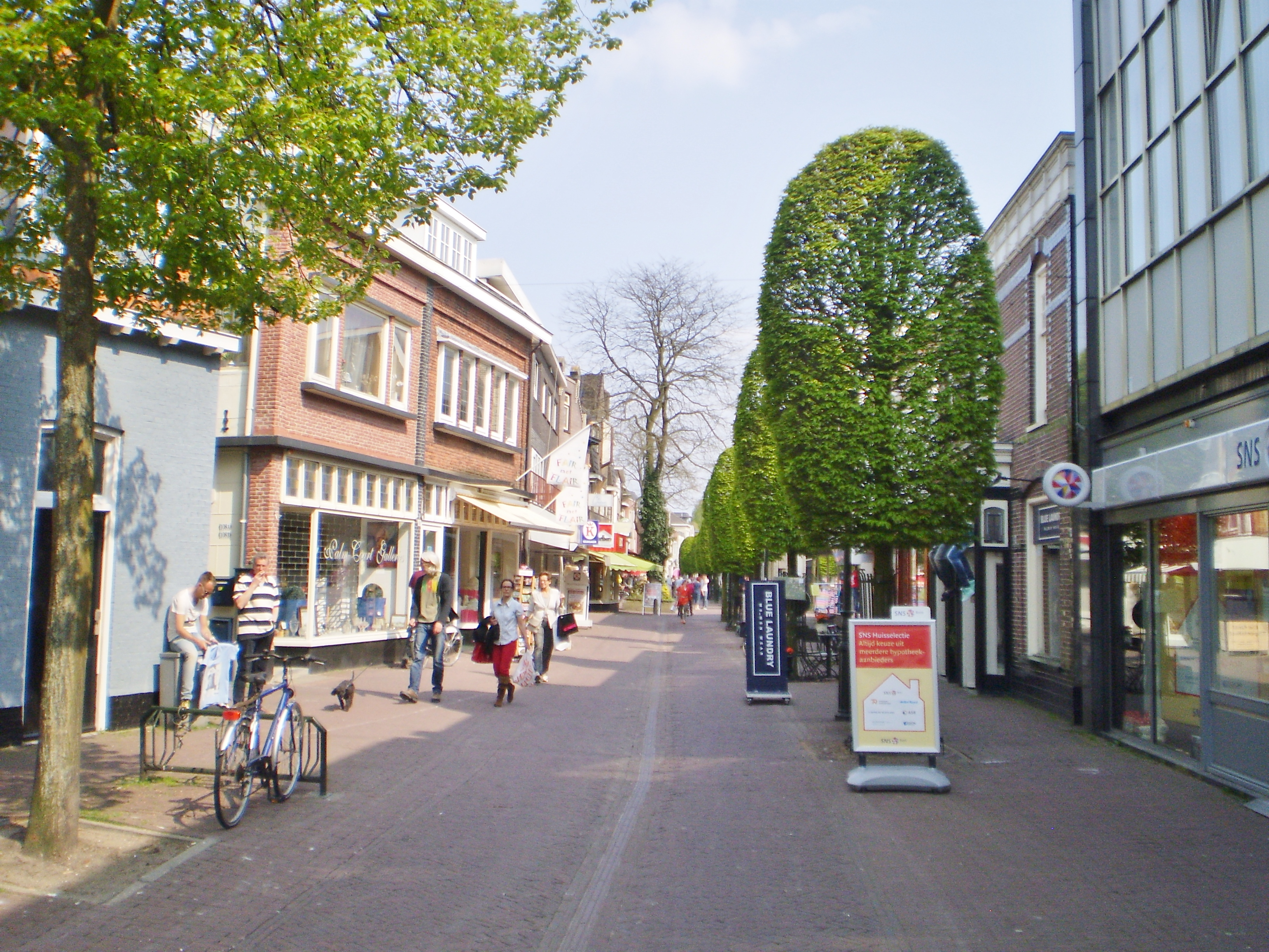 Genomen ter hoogte van de Nieuwstraat